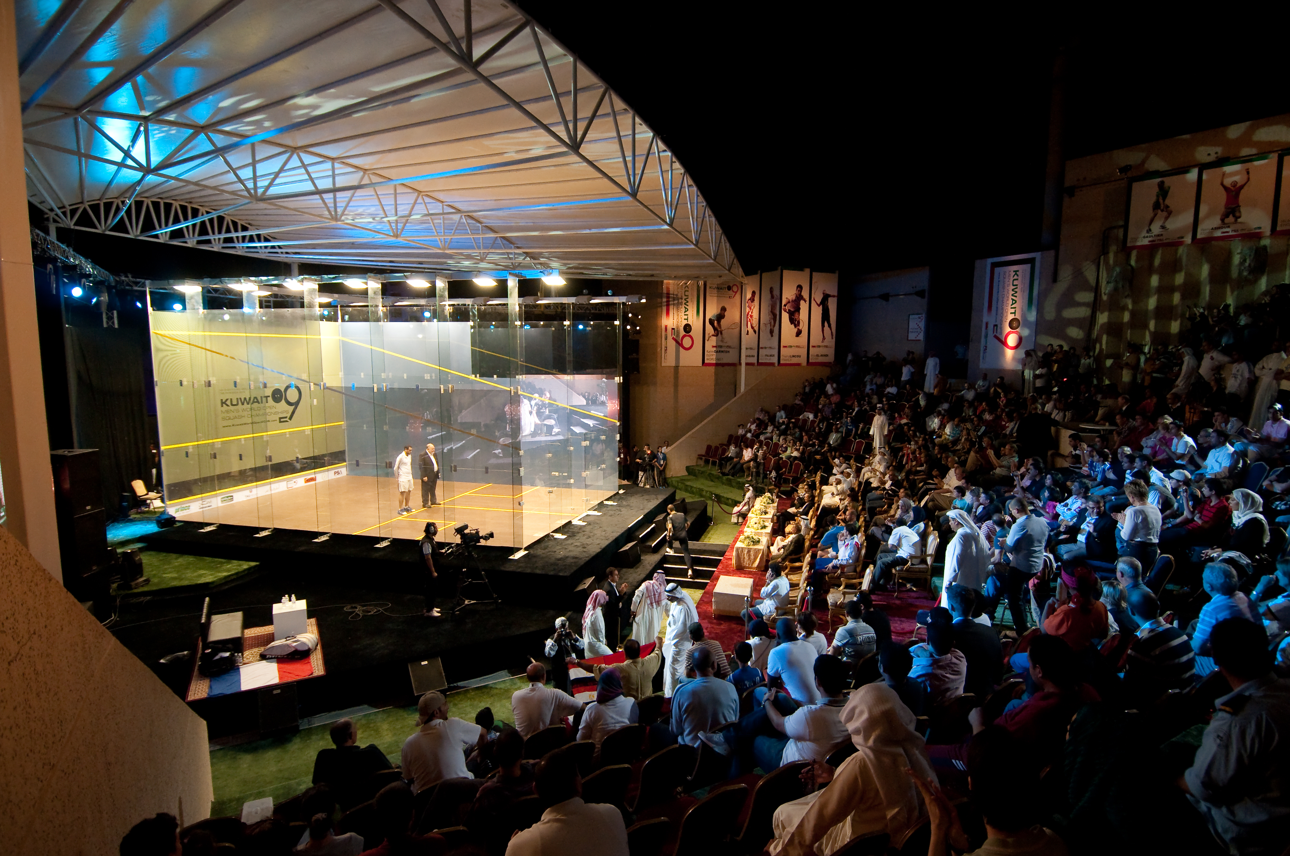 Semi Finals